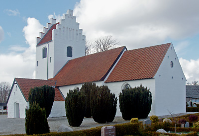 Halling Kirke, Odder Kommune, Hads Herred, Århus Amt, Denmark